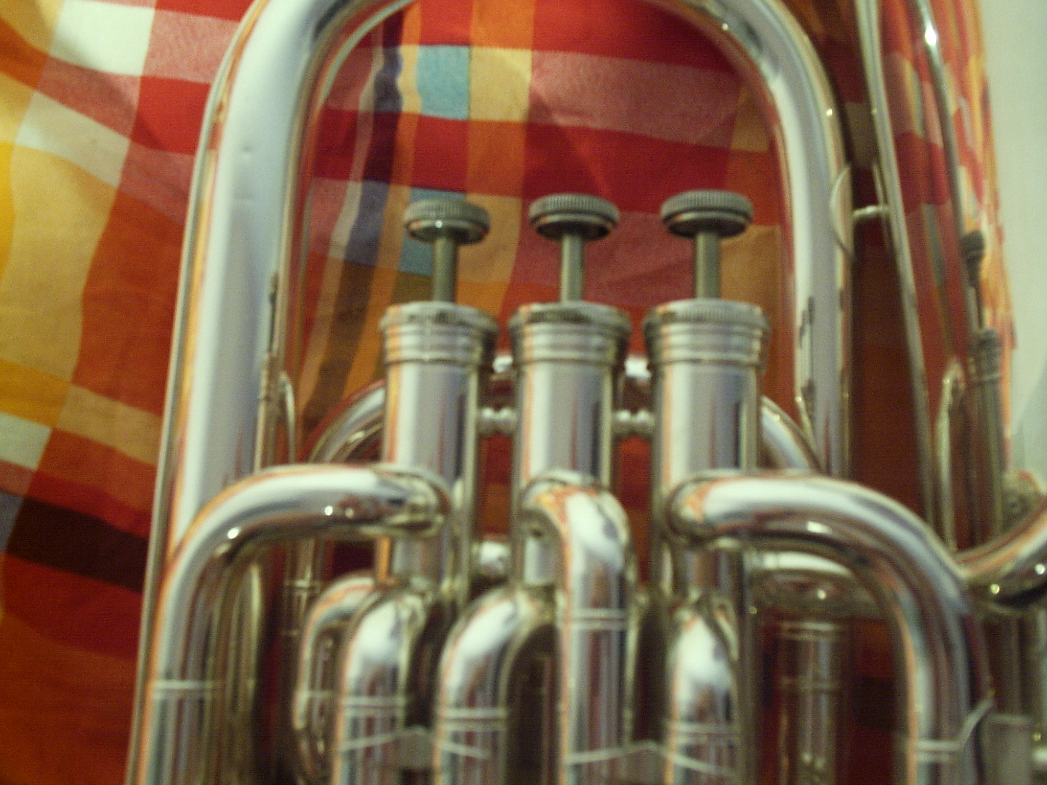 Euphonium ventielen